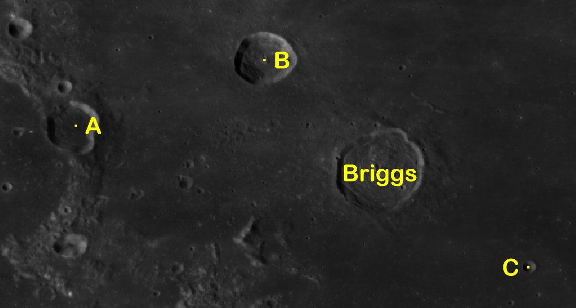 Cráter lunar Briggs. Cráteres satélite. (Imagen LRO)